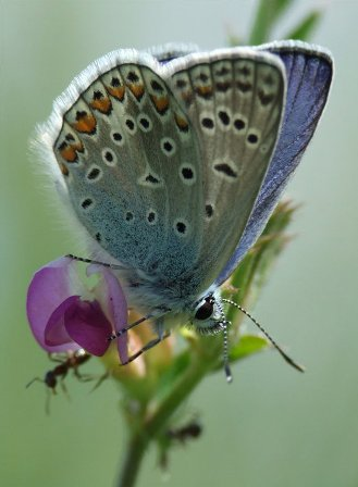 Közönséges boglárka (Polyommatus icarus) az ásotthalmi lápréten